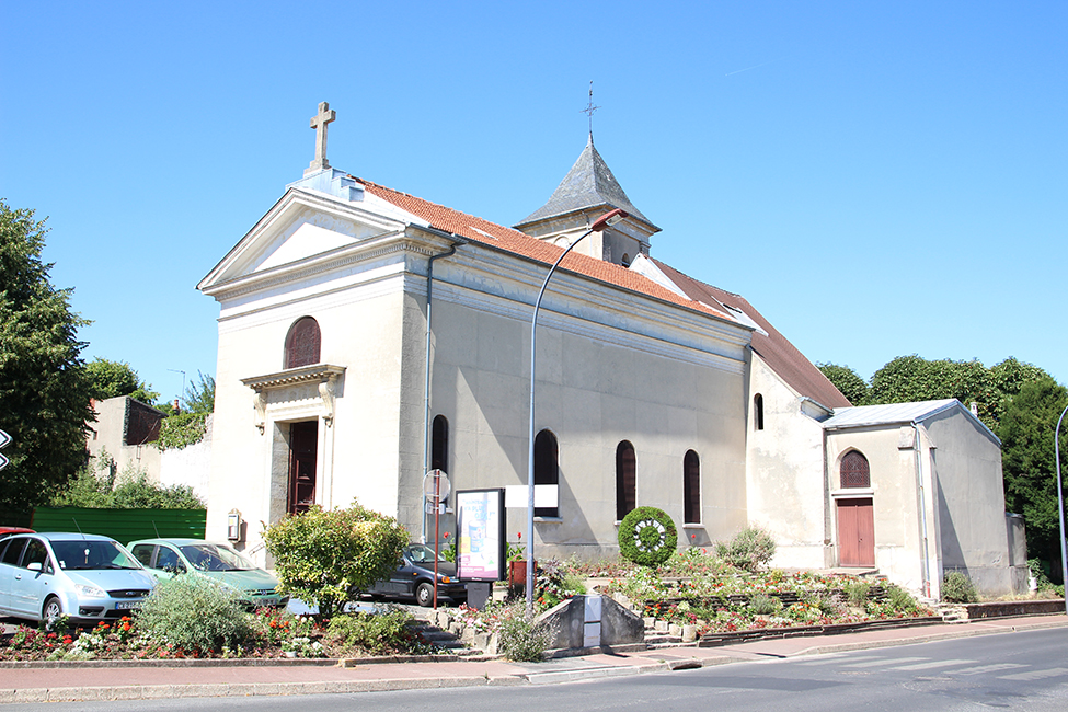 Montfermeil Église Saint-Pierre-Saint-Paul